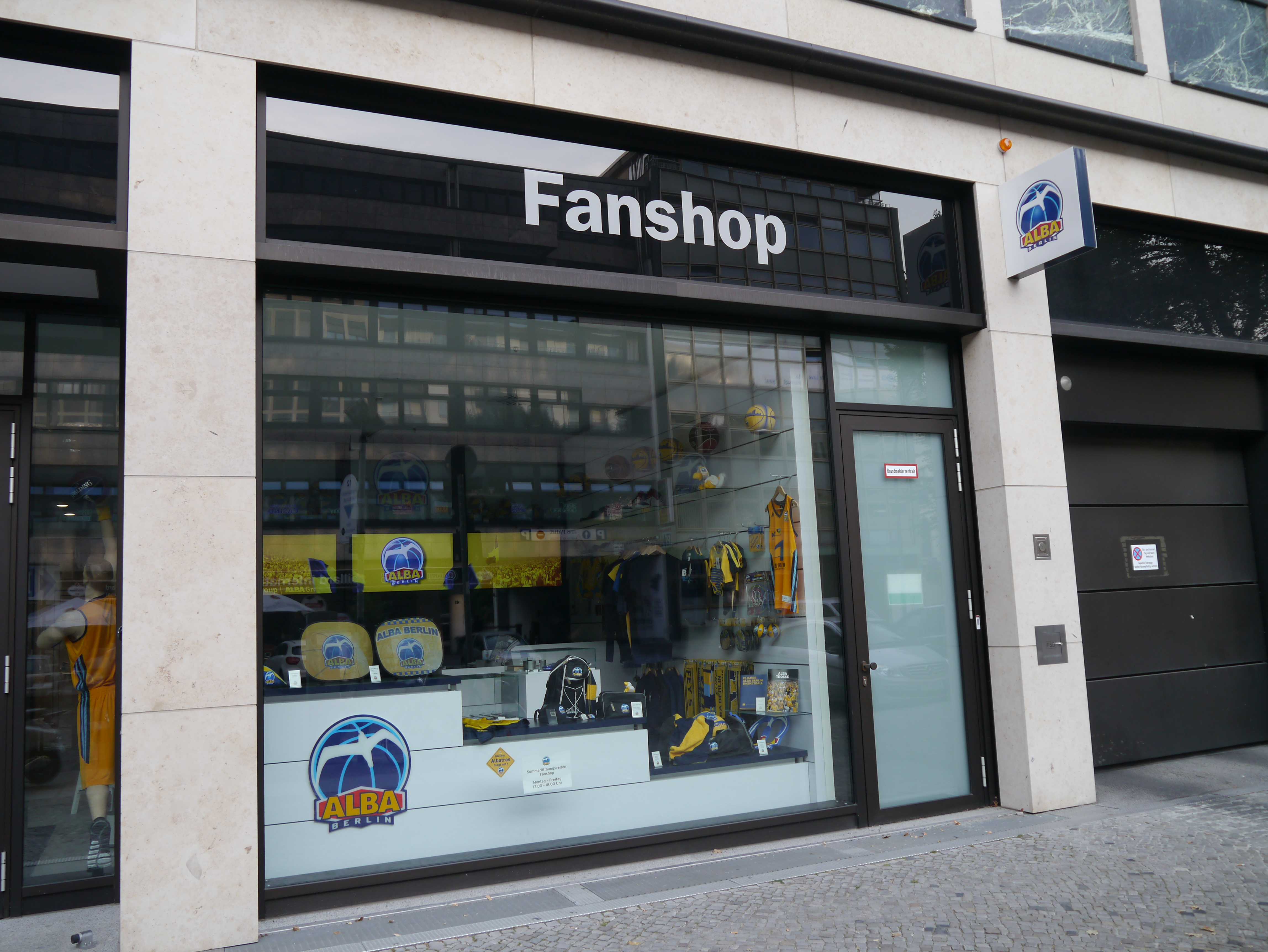 ALBA Group Zentrale Berlin (Knesebeckstraße) 2015.